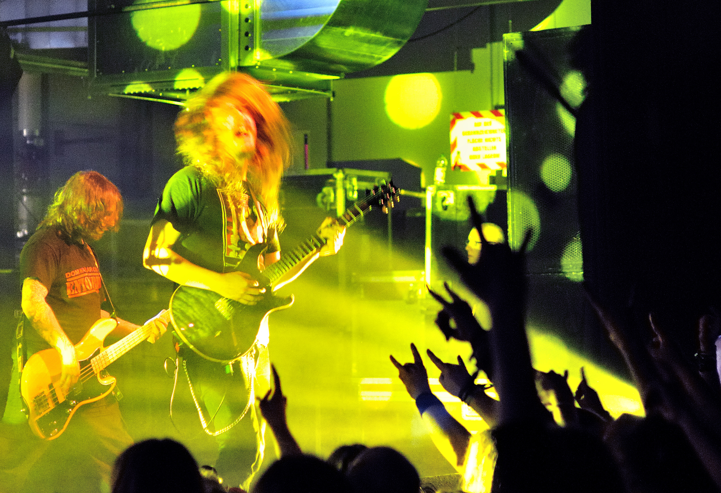 Opeth, Munich Backstage Werk, Saturday 6 December 2008 Mikael Åkerfeldt, Martin Mendez